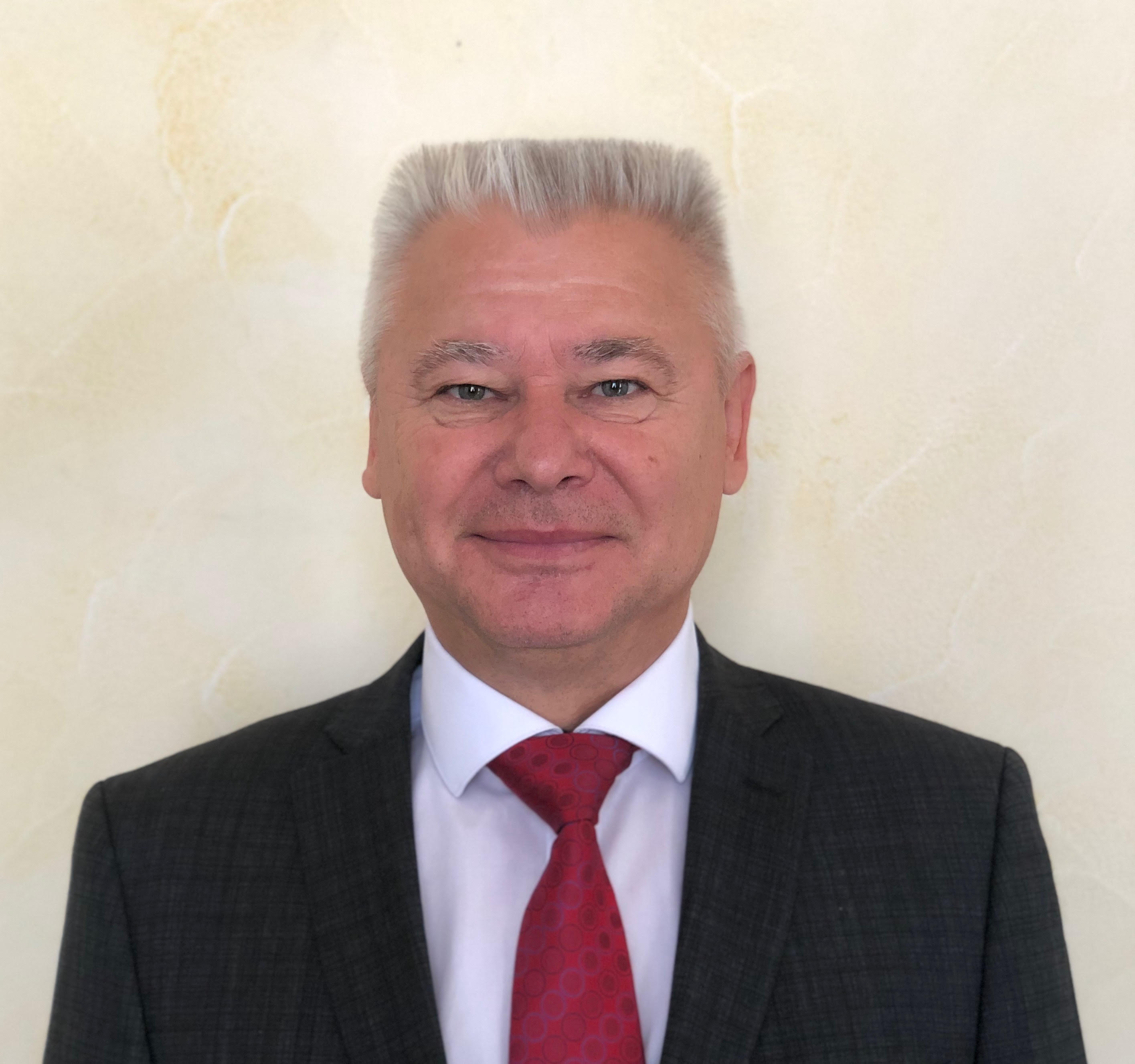 Фотографія людини, про яку написана стаття